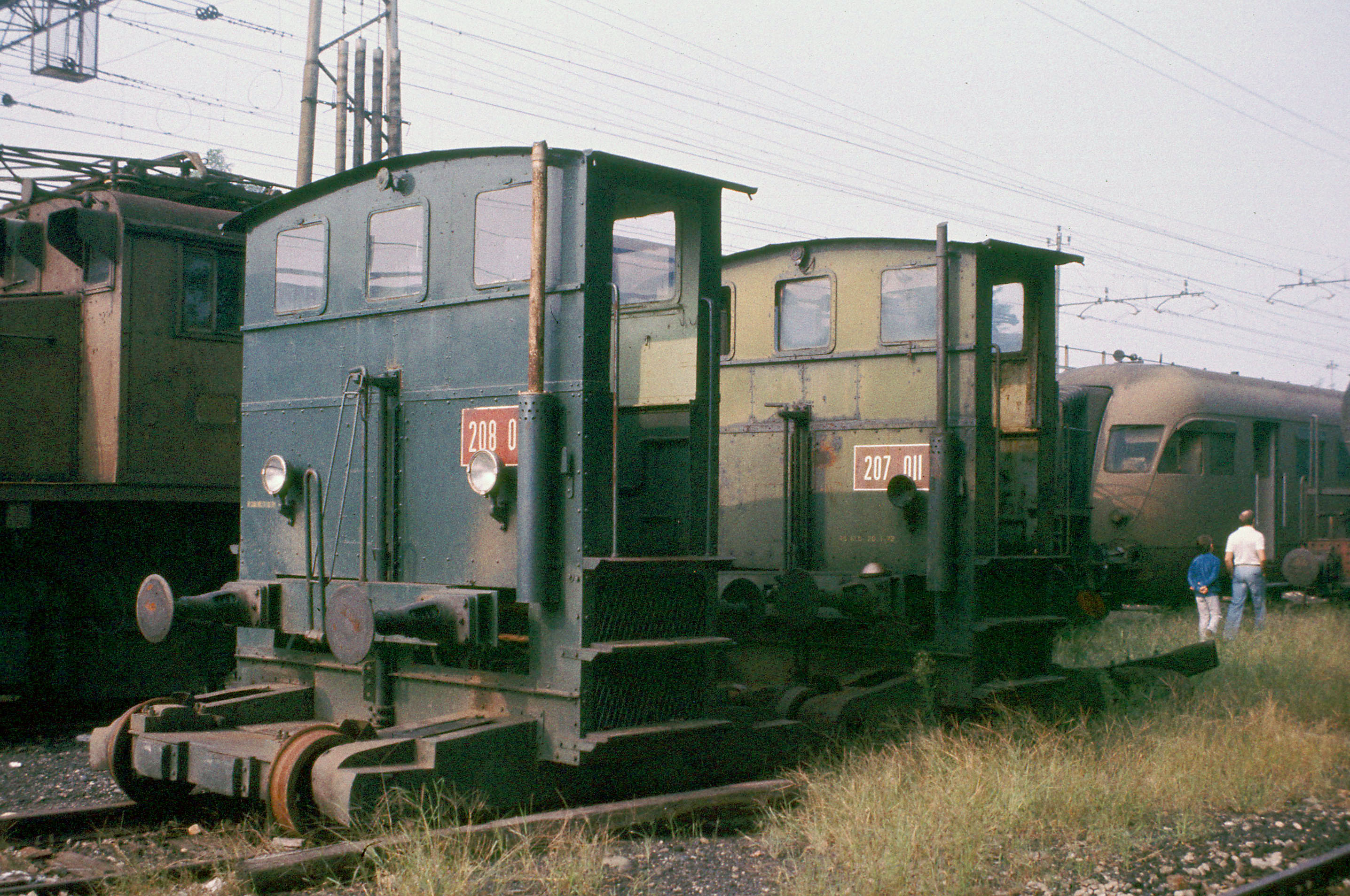 Automotori 207 e 208 Foto scattata da Sandro Baldi di Bologna. Deposito Locomotive di Bologna Centrale - Anno 1980 circaInserita da Utente:Horatius